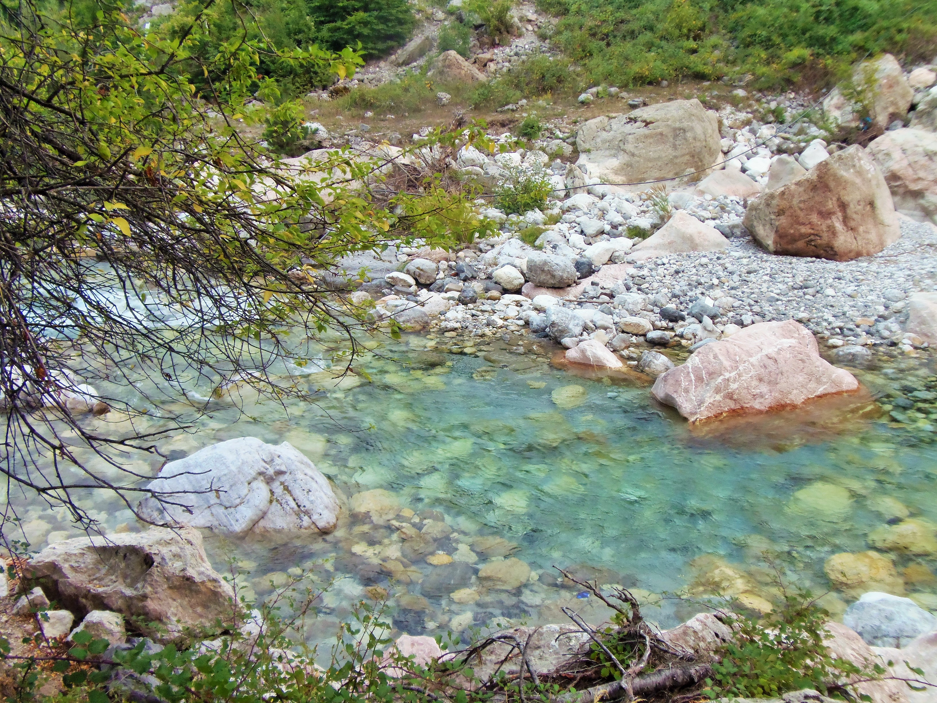 Thethi, Shkoder